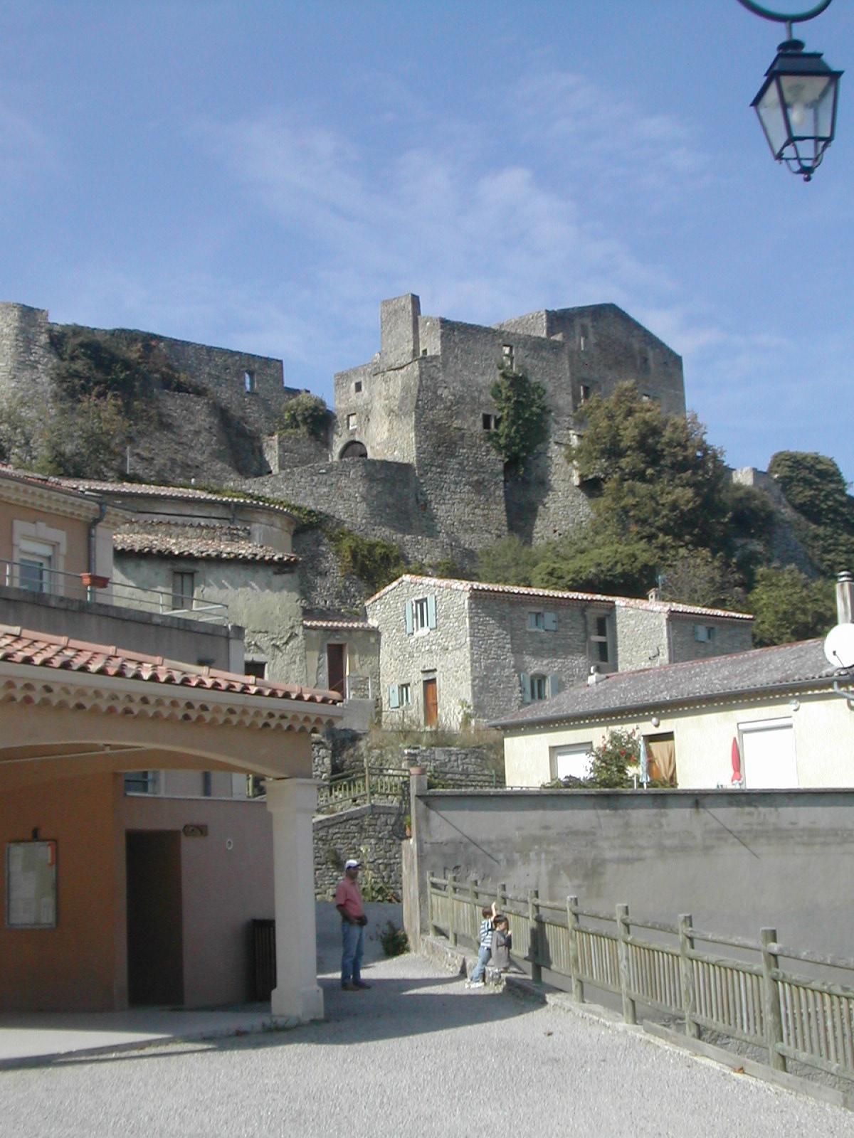 Le Poët-Celard (Drôme)